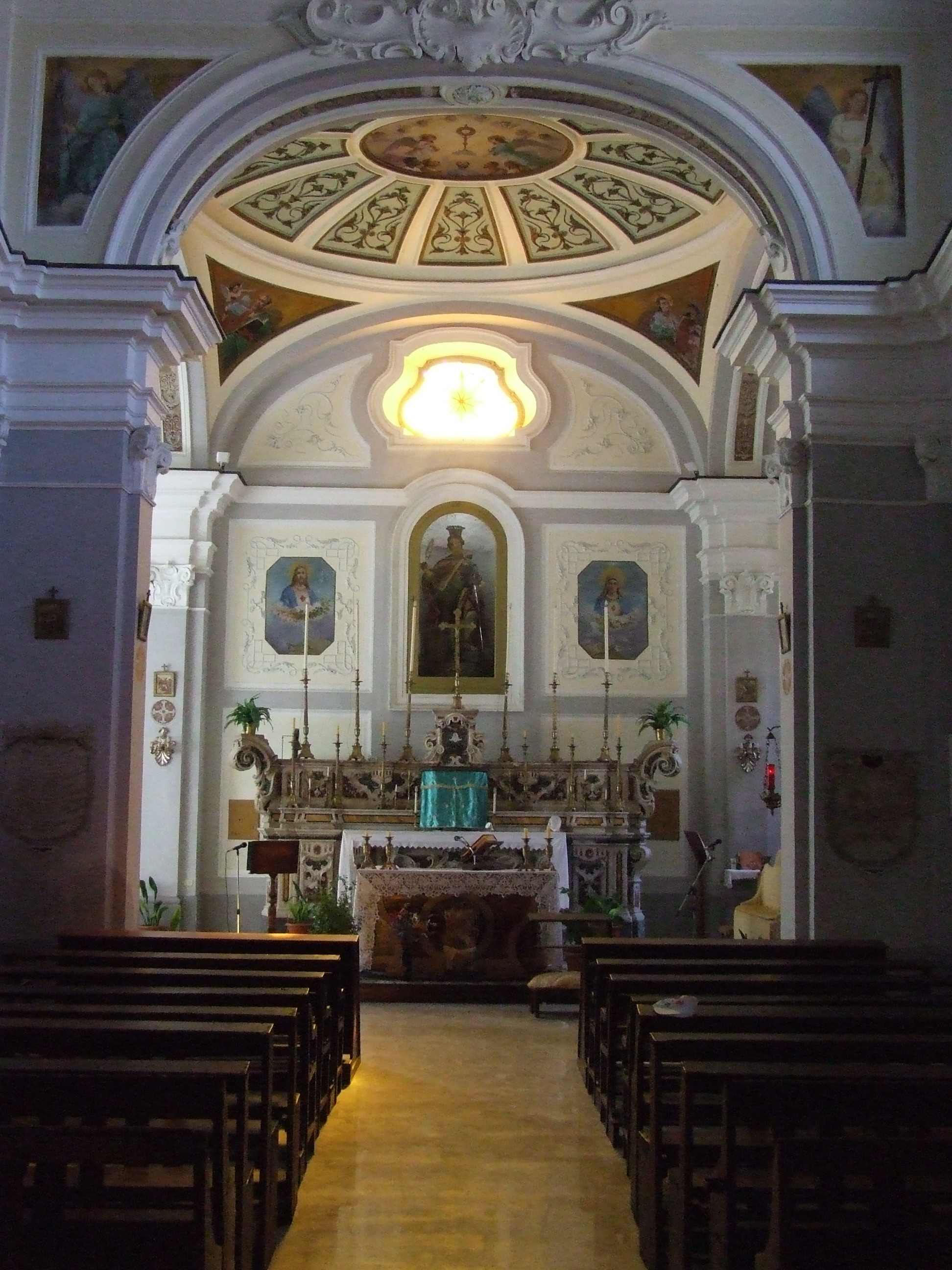 Altare maggiore della Chiesa di Santa Caterina di Caggiano